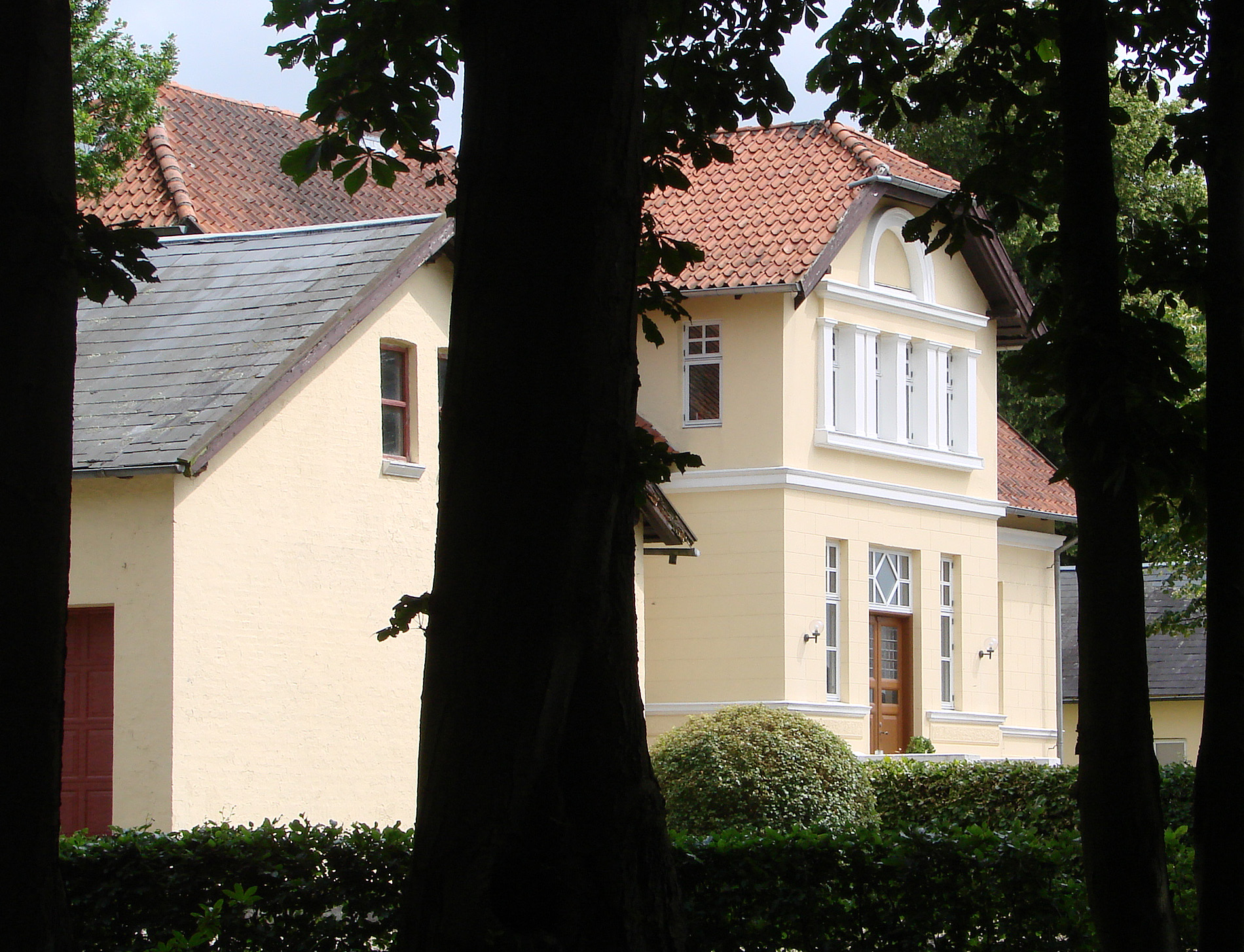 The estateRantzausgave near Odder in Jutland, Denmark